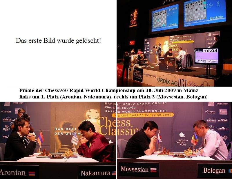 Chess Tigers Chess960 2009-07-30, neue Fassung aufgrund einer Löschung.